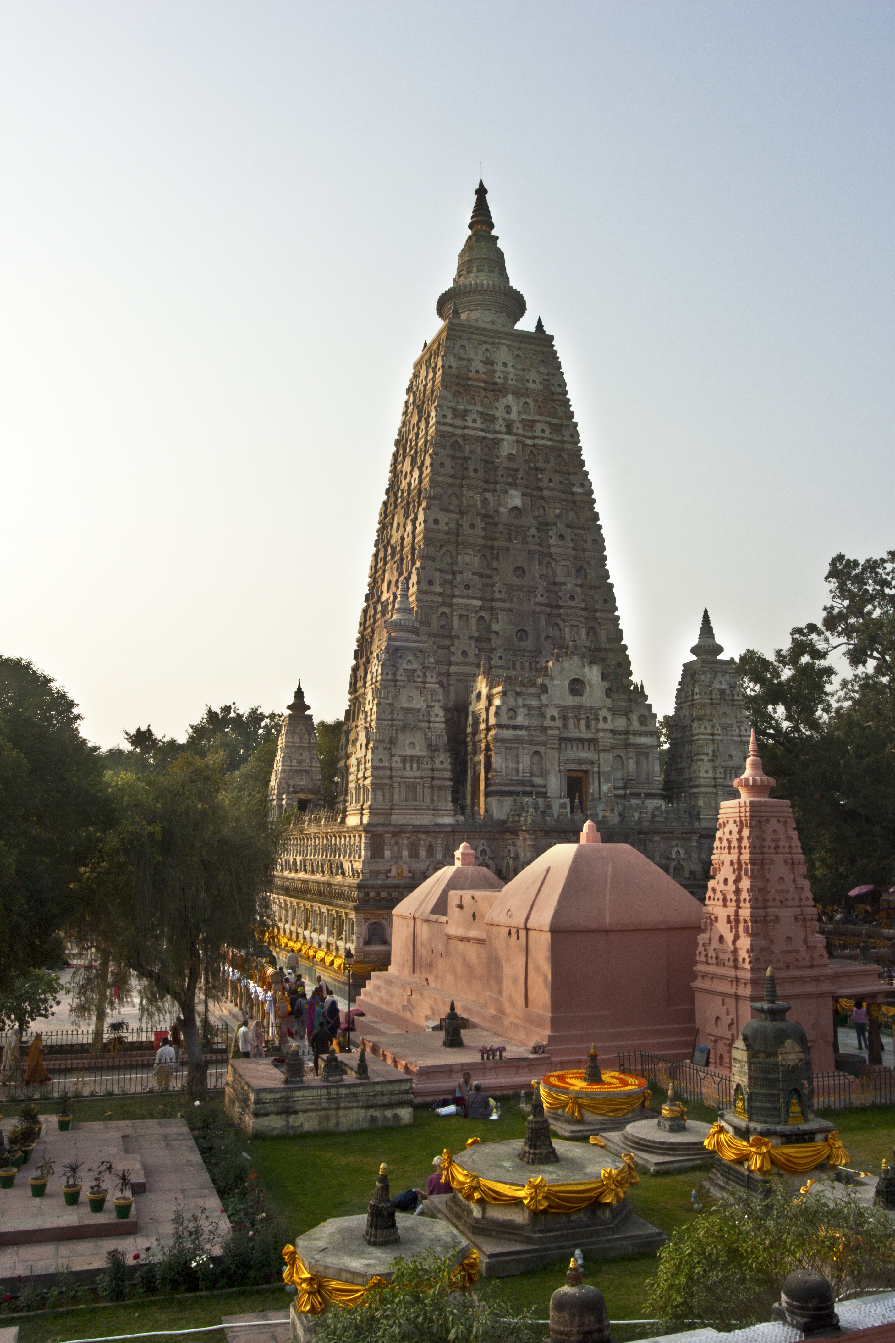 Mahabodhi Temple Complex at Bodh Gaya, Bihar, India